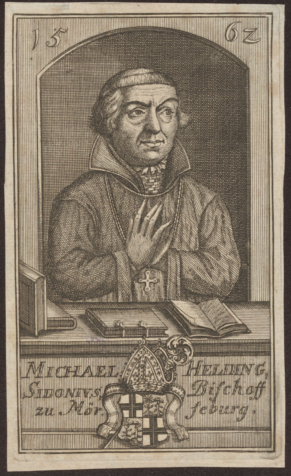 Michael Helding, genannt Sidonius, Bischof von Merseburg und Weihbischof von Mainz (1506-1561)